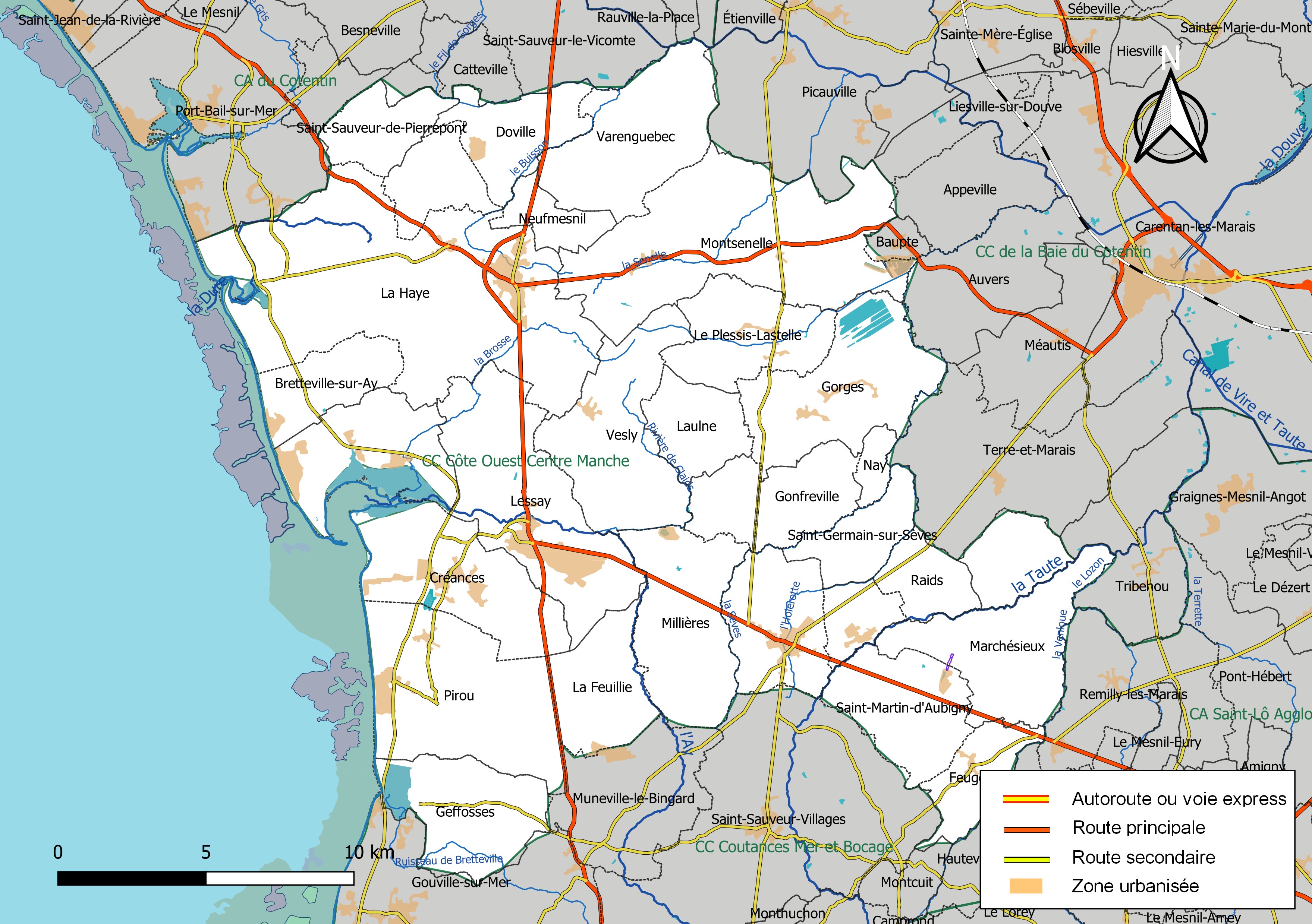 Carte géographique de la Communauté de communes Côte Ouest Centre Manche, département de la Manche, France. Composition au 1er janvier 2019.